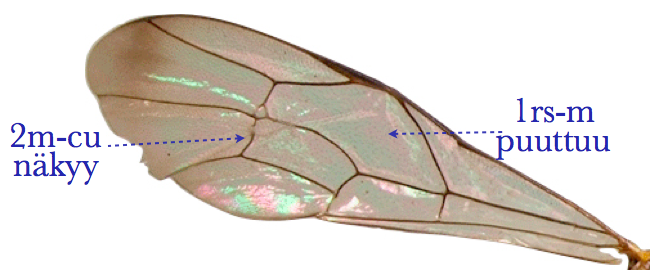 Naaraspuolisen ahmaspistiäisen etusiipi (Ichneumonidae: Syzecteus sp.). Pistiäinen kerättiin kibalen kansallispuistossa Ugandassa vuonna 2011. Kuvaan on lisätty tekstiä joka selventää miten ahmaspistiäiset (Ichneumonidae) erottaa vainopistiäisistä (Braconidae).